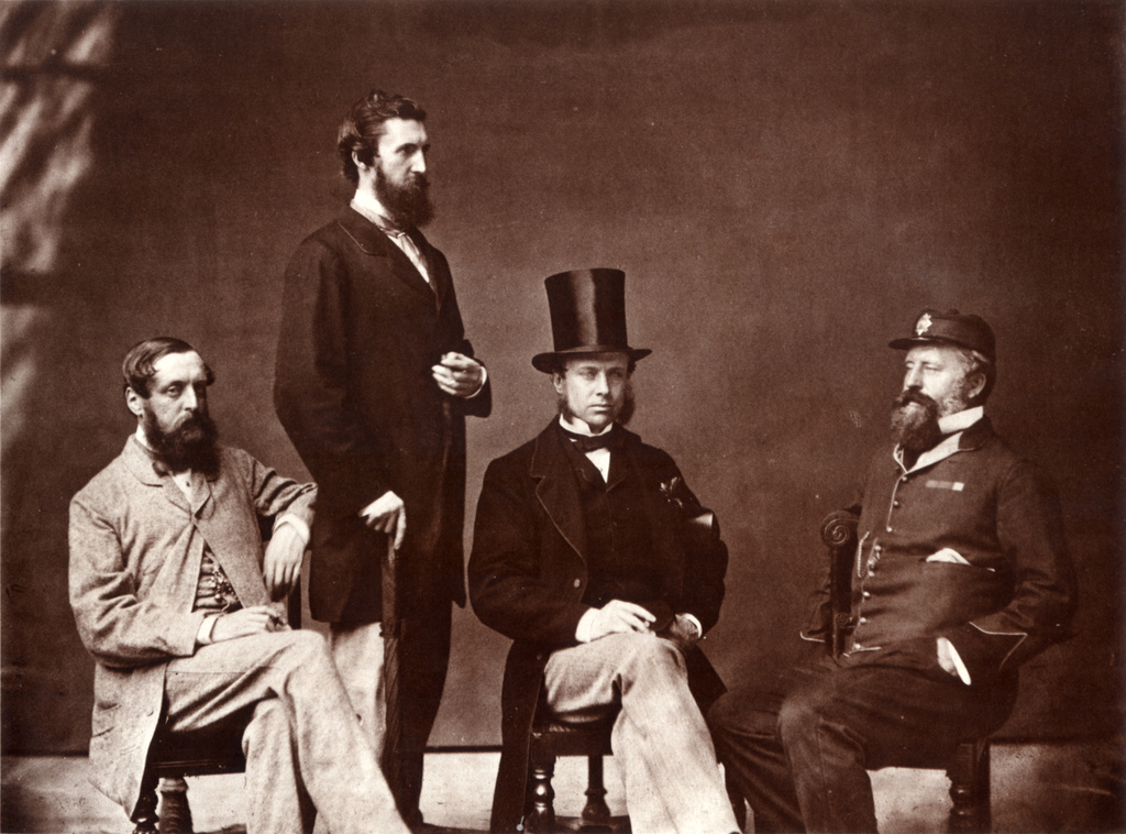 The image here is claimed to be Public Domain as it is: There are no copyleft alternatives of such a photo; The image used is of a ceremonial and not a commerical value; The article is greatly improved by the prominence of this photo; Which is hosted and displayed on the not-for-profit Wikipedia Encylopedia for educational purposes. { }